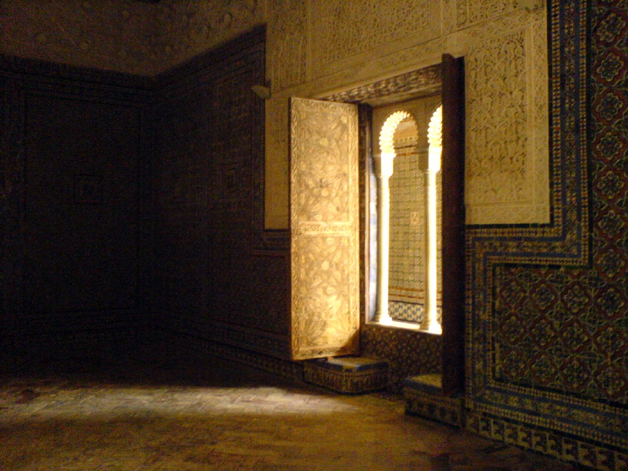 Salón del Pretorio de la Casa de Pilatos (Sevilla, Andalucía, España).